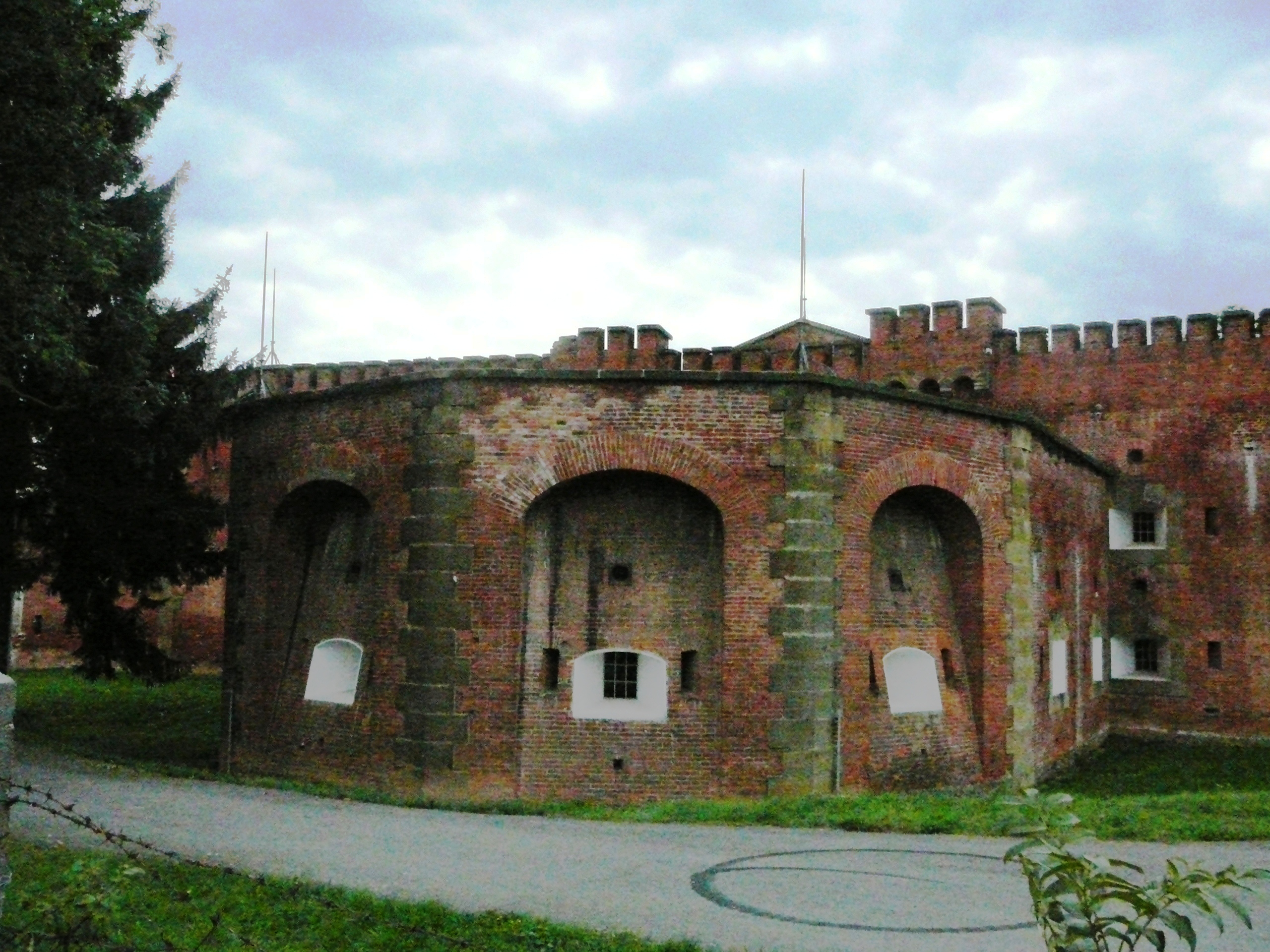 Předsunuté opevnění - fort XVII Křelov, jihozápadně od obce Křelov.